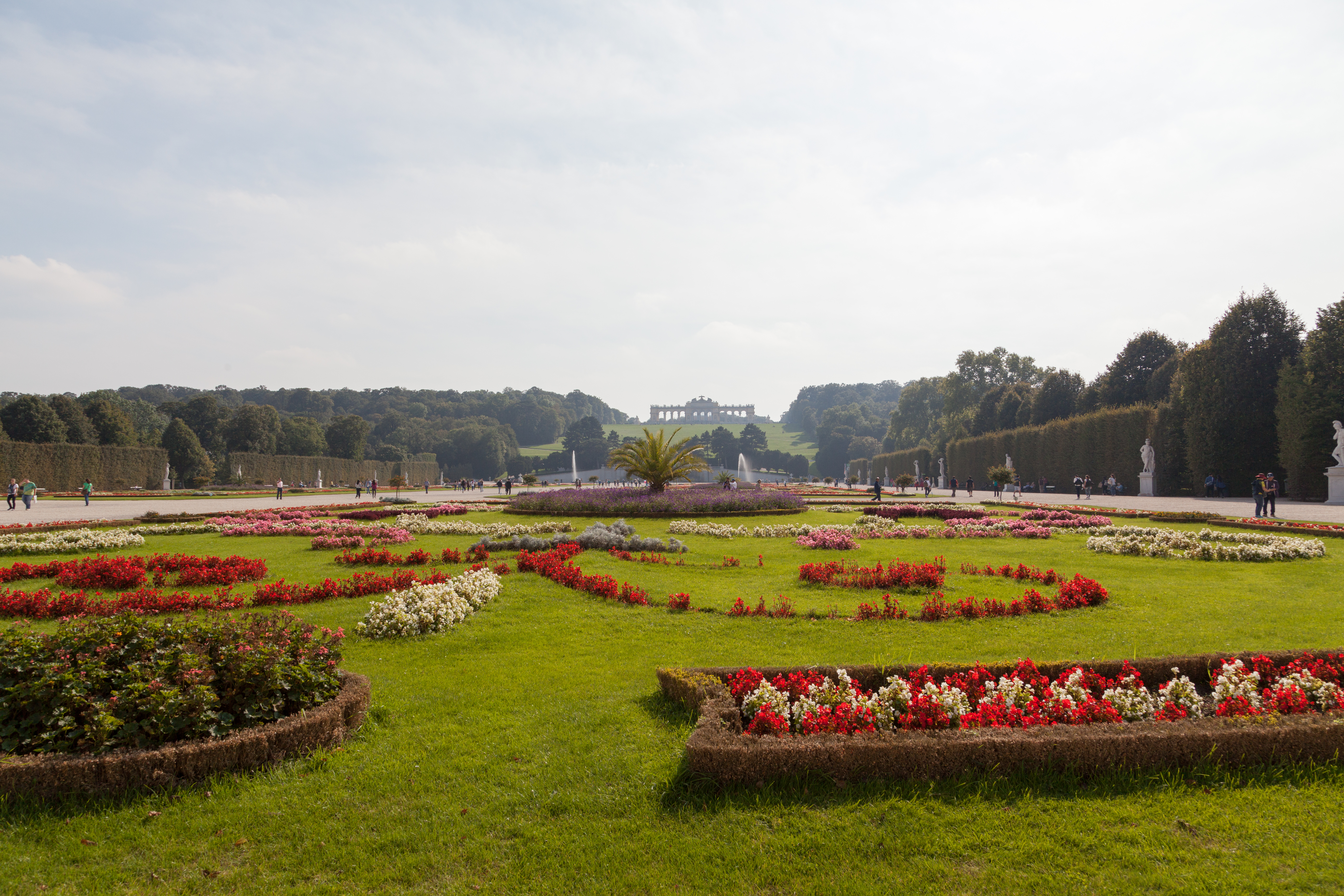 Großes Parterre und Gloriette (2014)